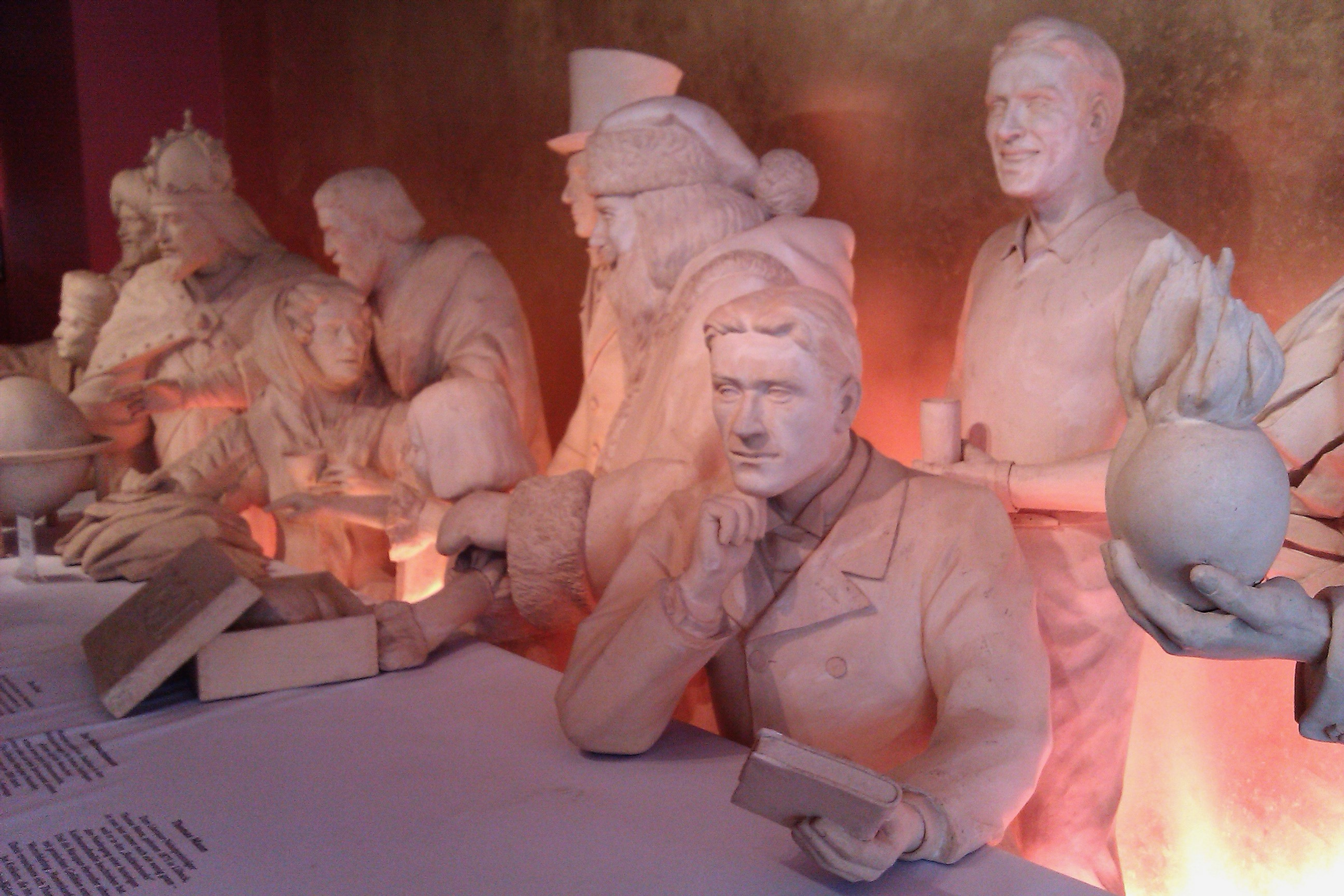 Niedereggers marcipanmuseum